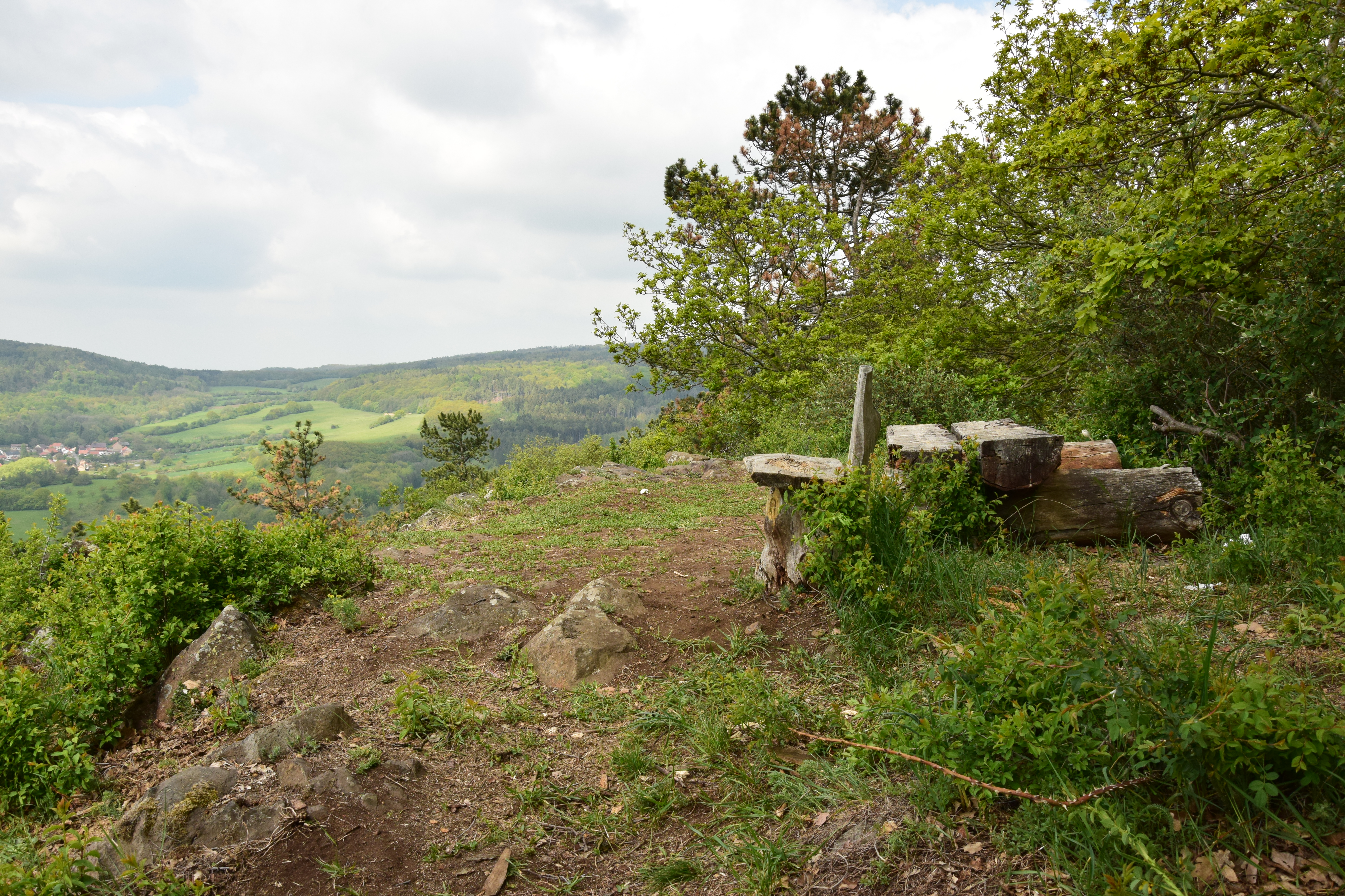 Hrad na Blešenském vrchu – vrcholová plošina